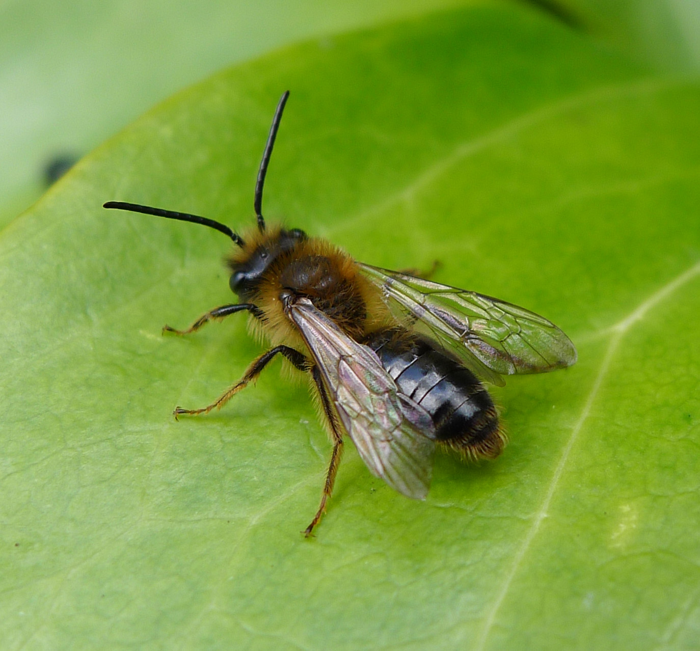 Probably Andrena scotica male.